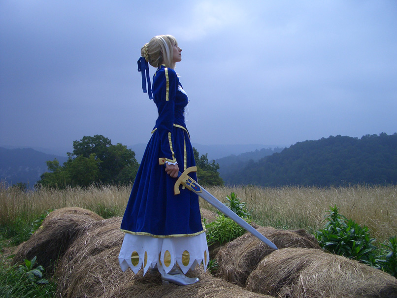 《Fate/stay night》Saber的cosplayer。